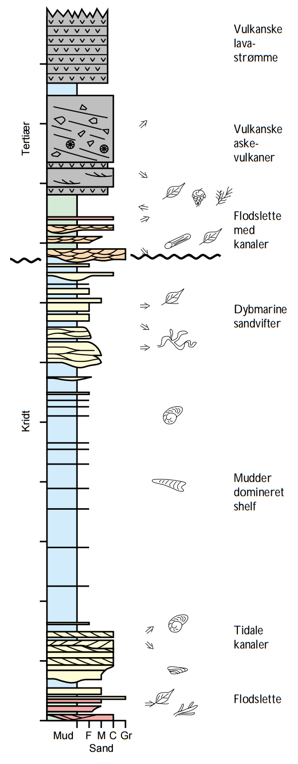 Sedimentologisk log for Kangerlussuaq-bassinet i Østgrønland.